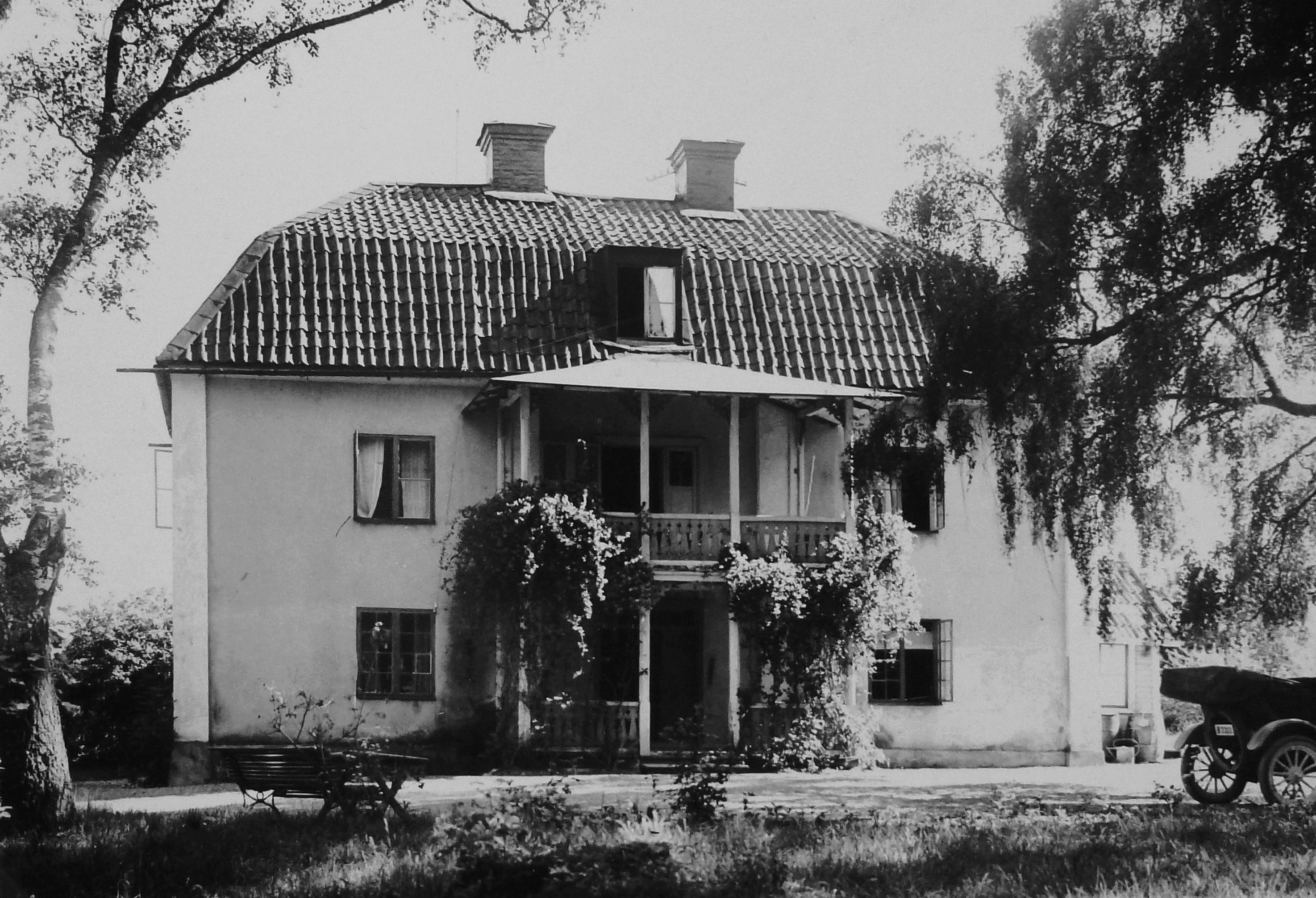 Fittja gård, "Ängsbyggningen"